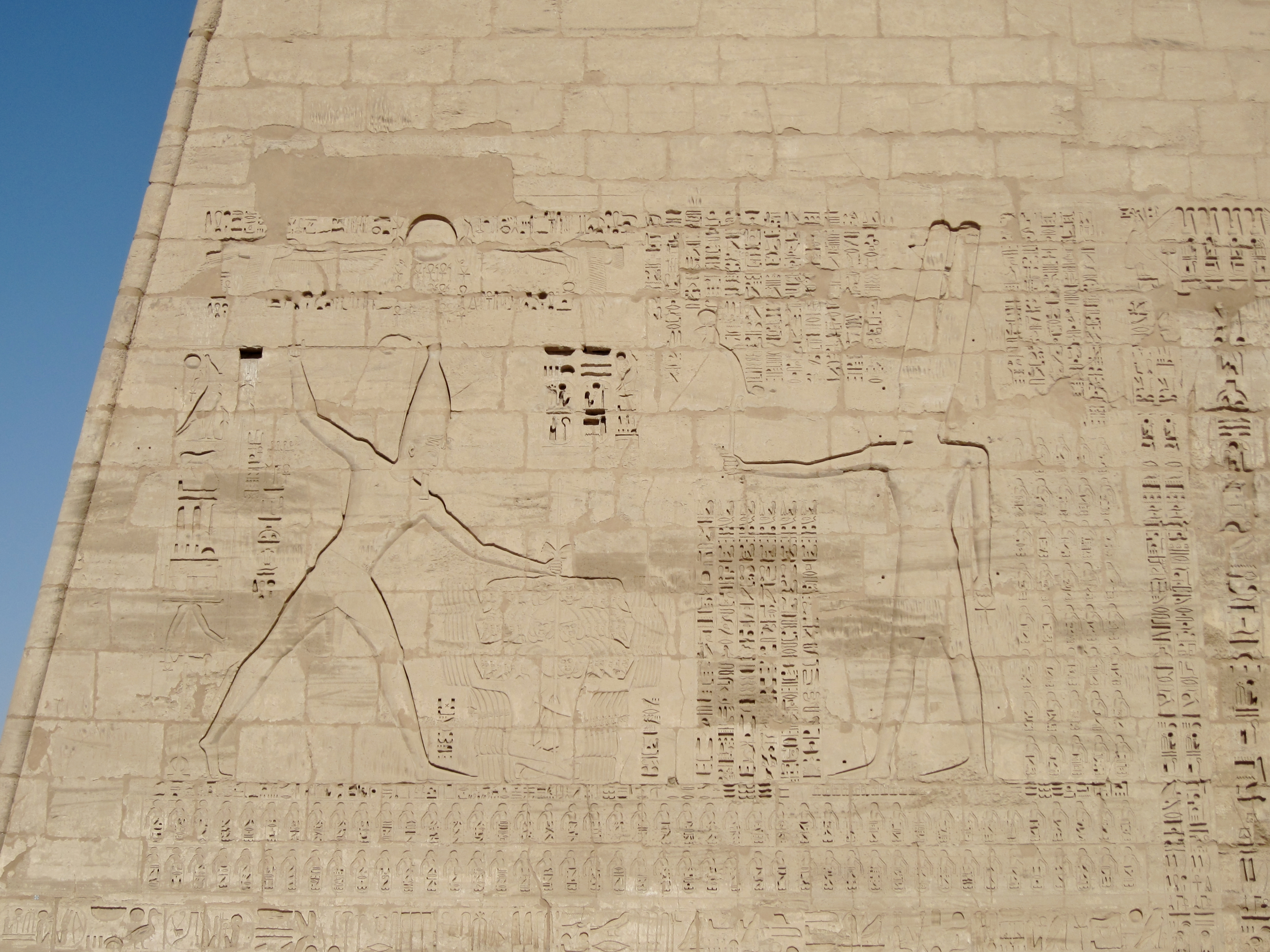 Relief an der Südostseite des ersten Pylons des Totentempels Ramses’ III. in Medinet Habu, Ägypten